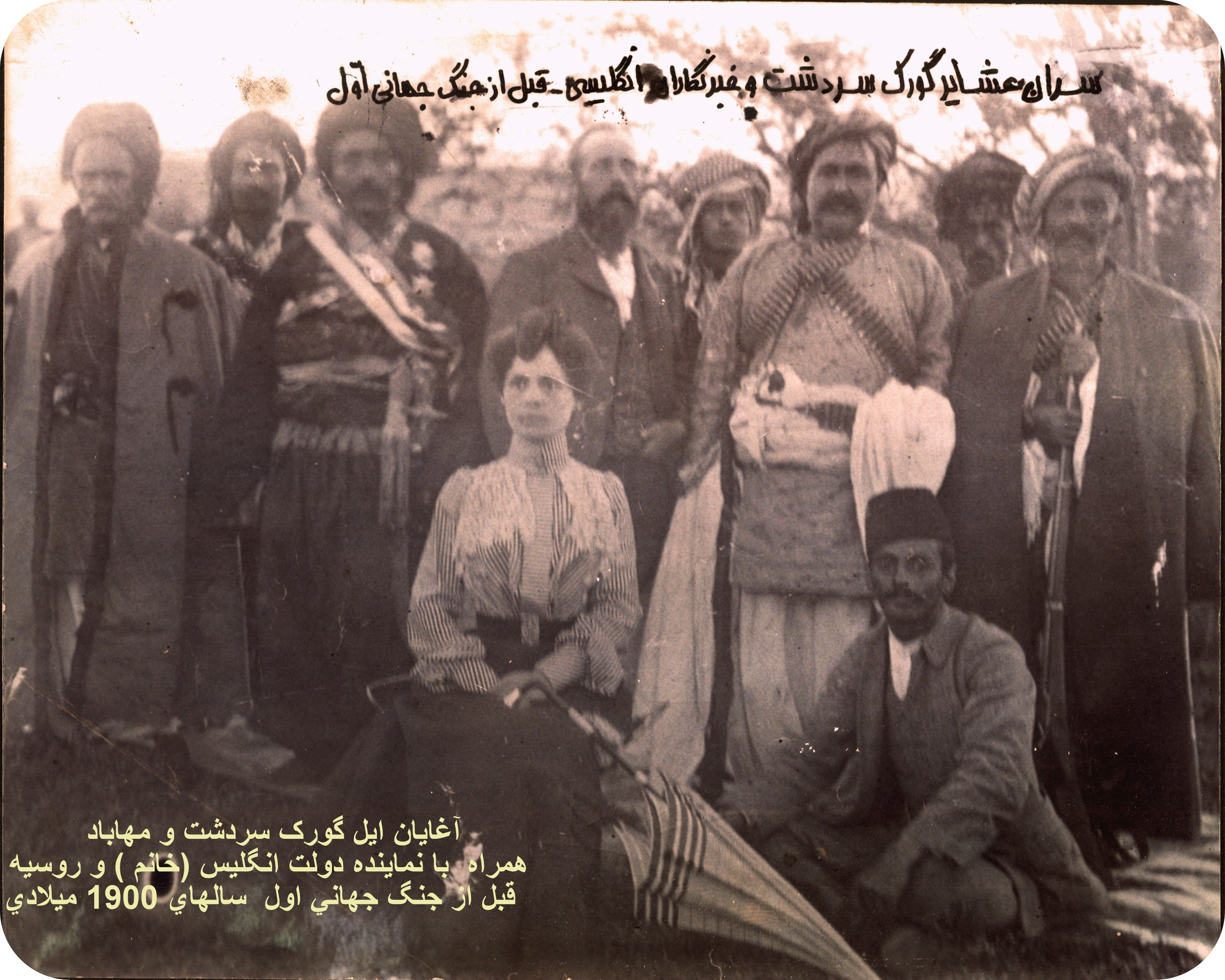 The Lords of Gawerk Dynasty in Kurdistan-Urmia - Sardaht آغایان ایل گورک در سردشت و مهاباد 1900 میلادی